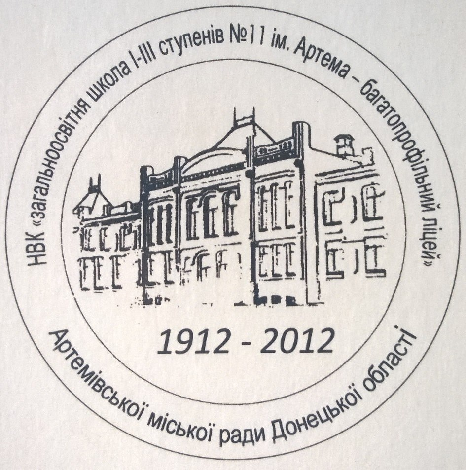 Емблема